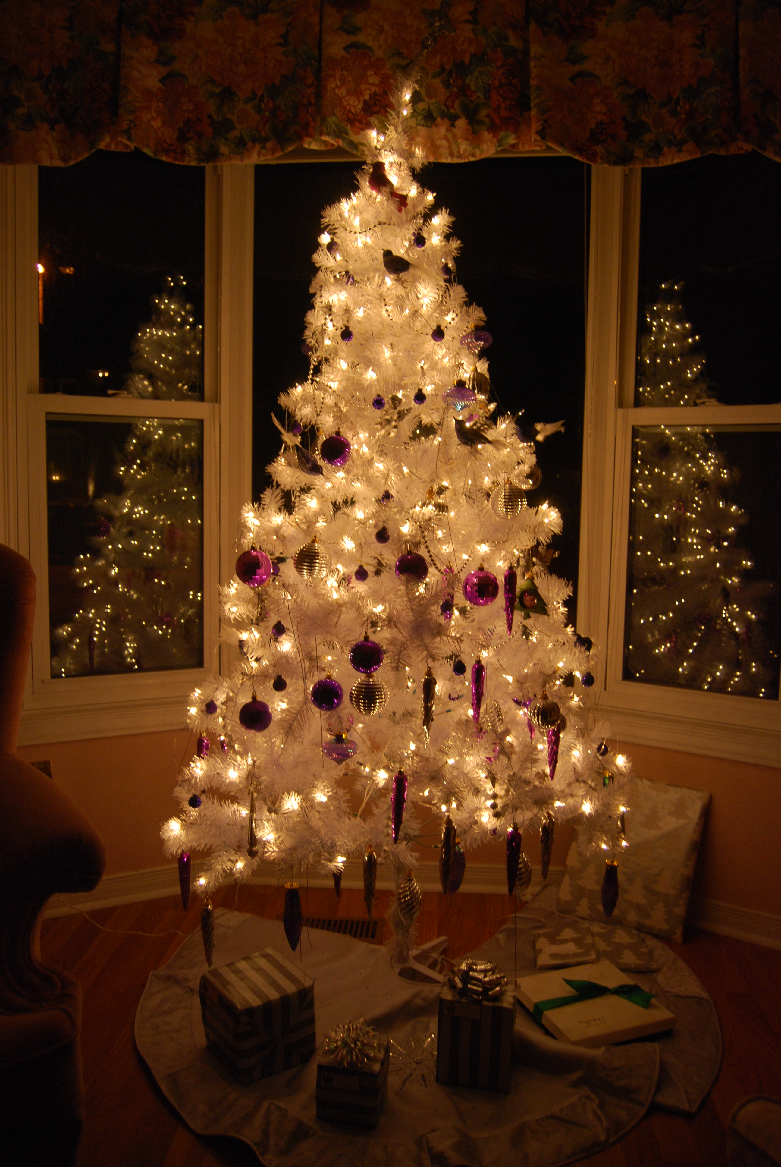 Xmas Tree